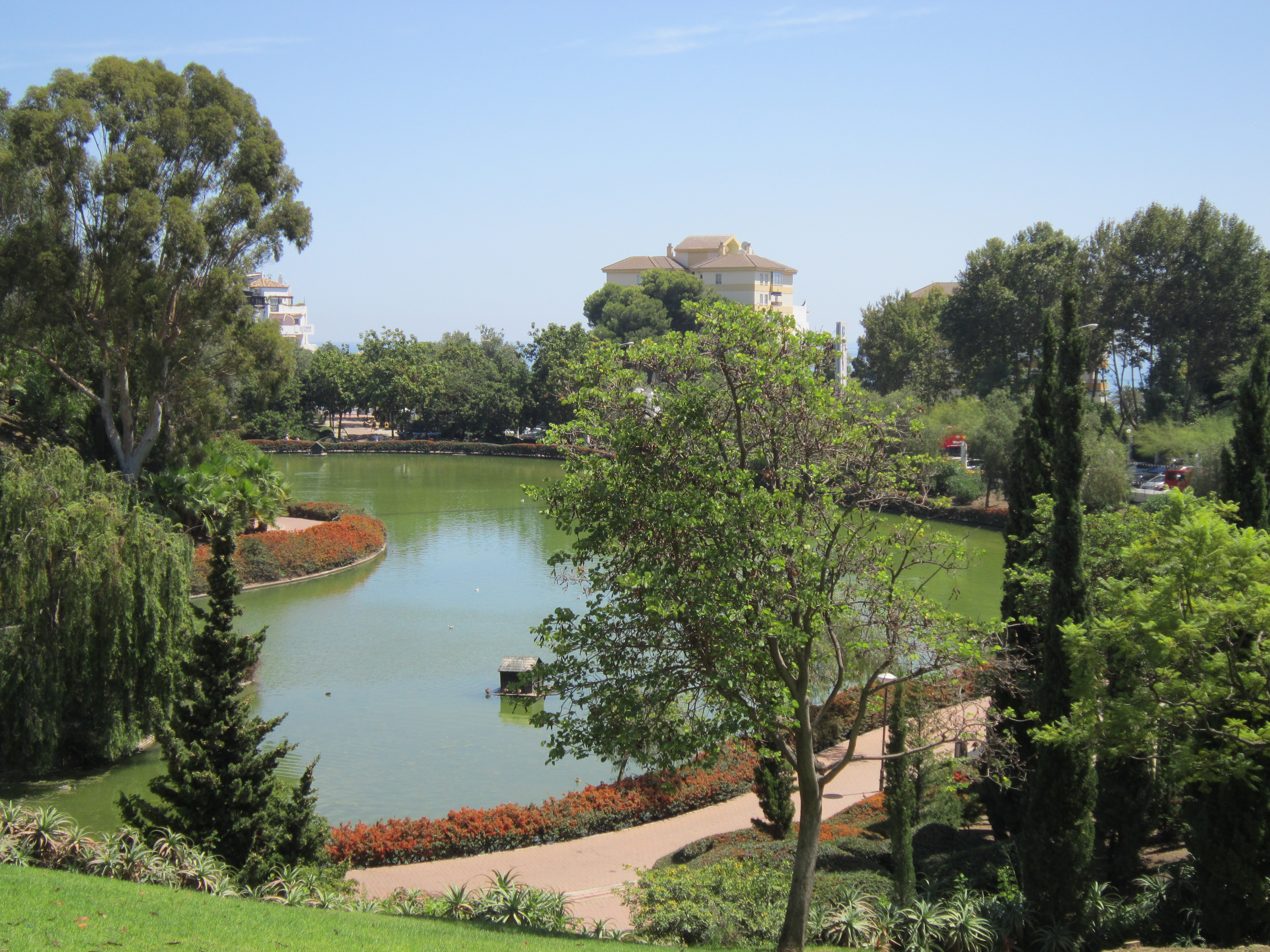 Parc de Paloma 3